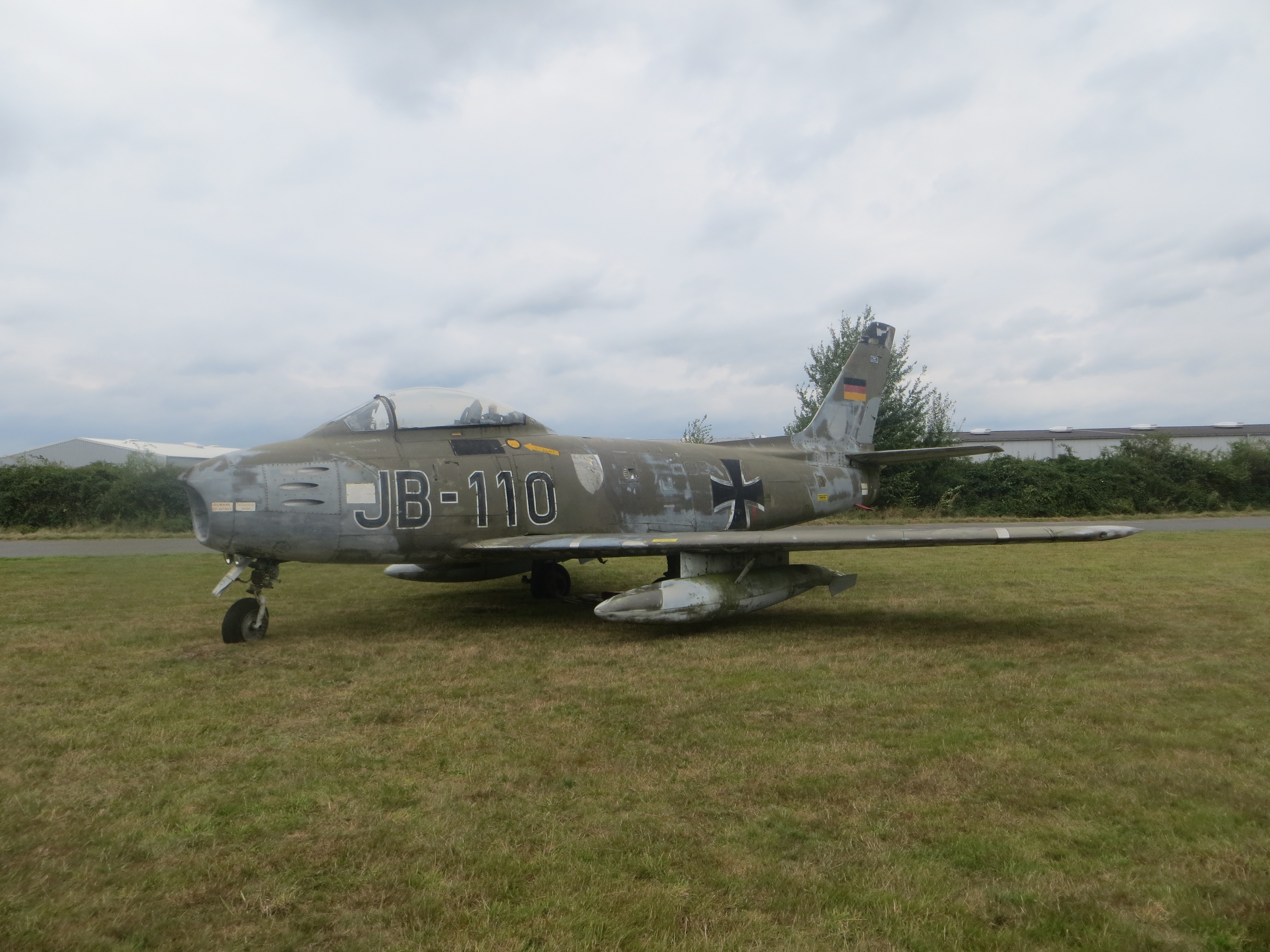 North American F-86, Canadair Sabre Mk.5 als Ausstellungsstück auf dem Flugplatz Heist